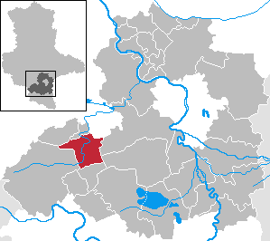 Obhausen in Saxony-Anhalt - Saalekreis